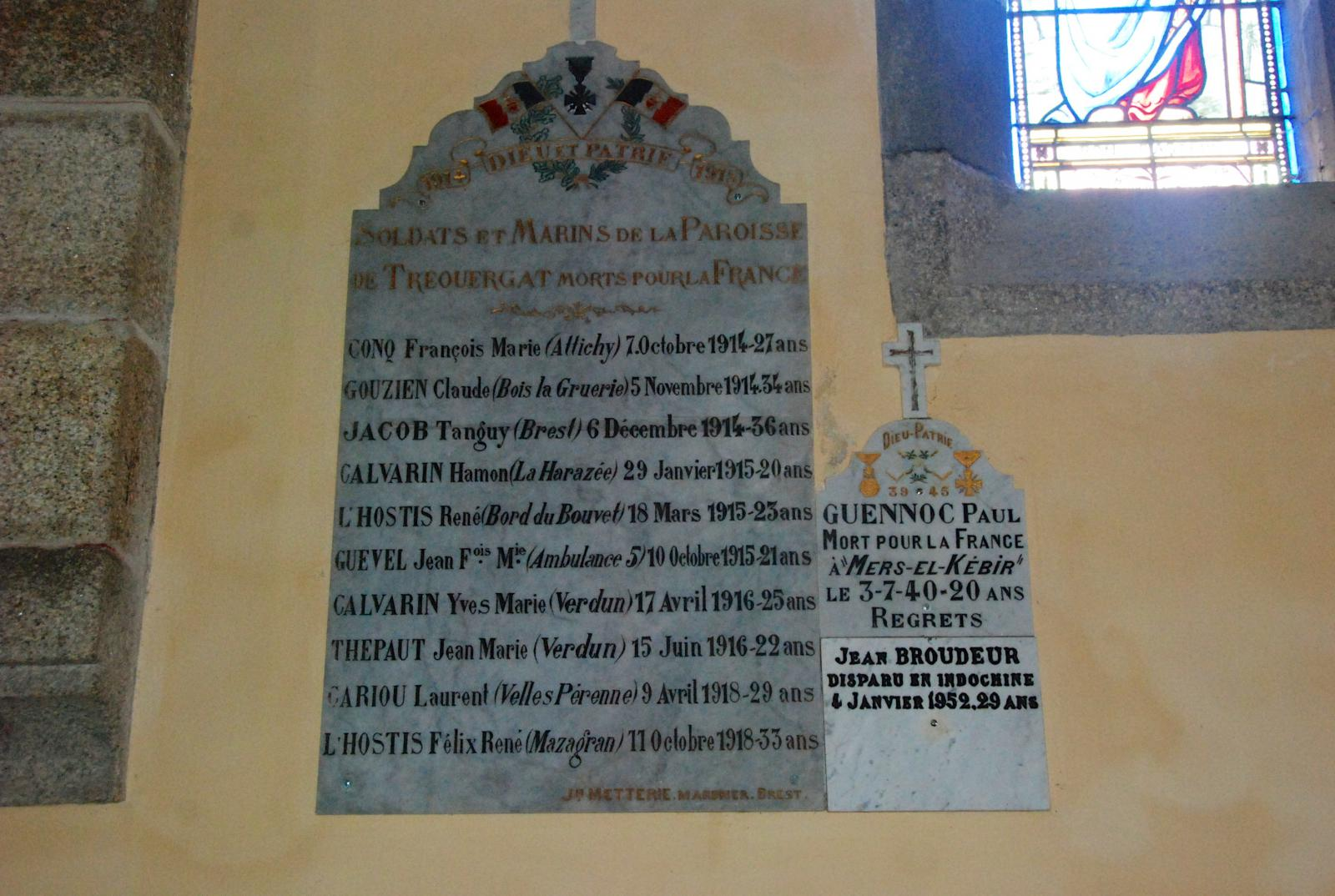 Plaque commémorative de la guerre de 14/18 dans l'église de Treouergat faisant office de monument aux morts